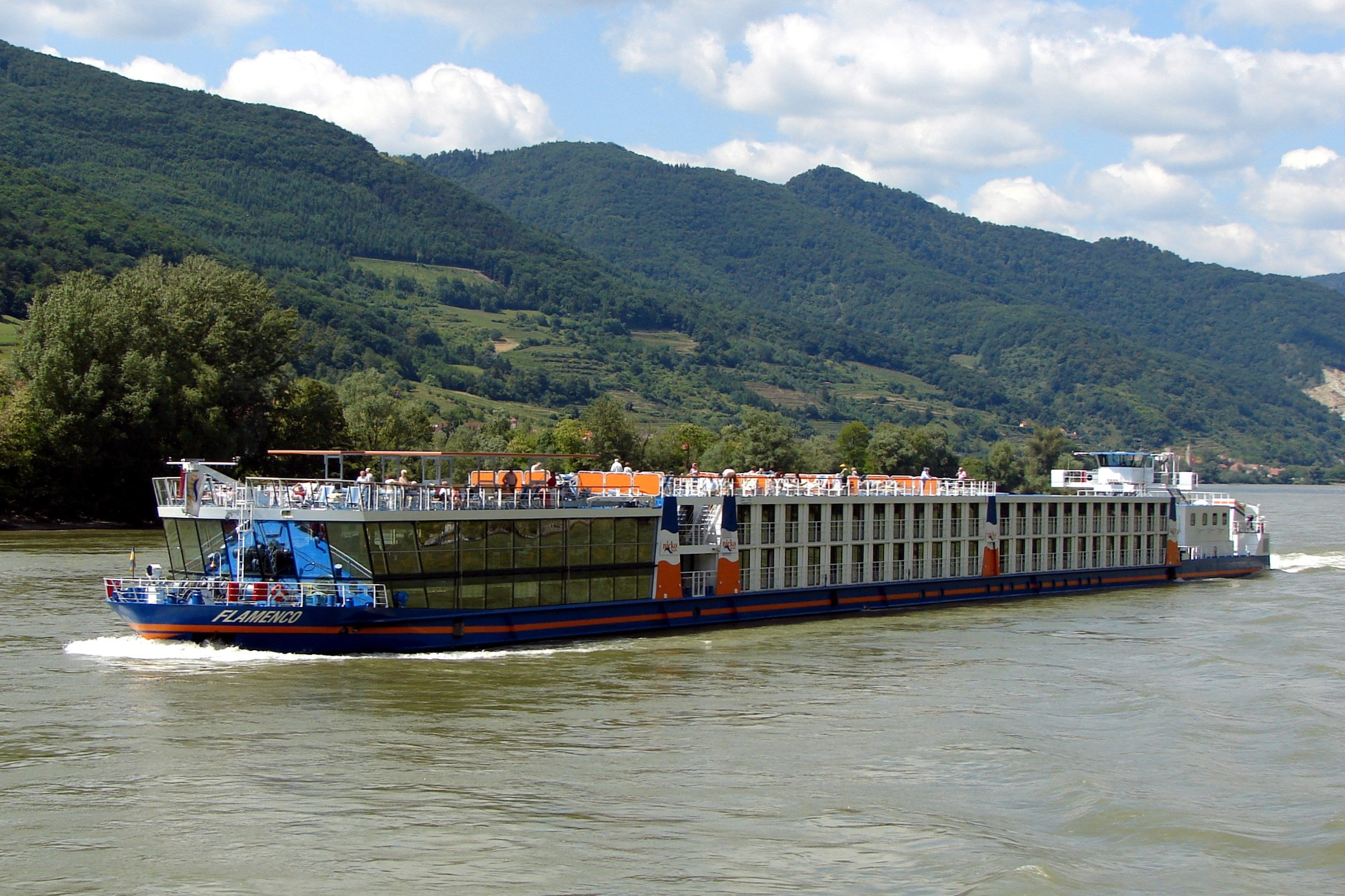 Das Passagierschiff MS Flamenco auf der Donau in der Wachau (Niederösterreich).